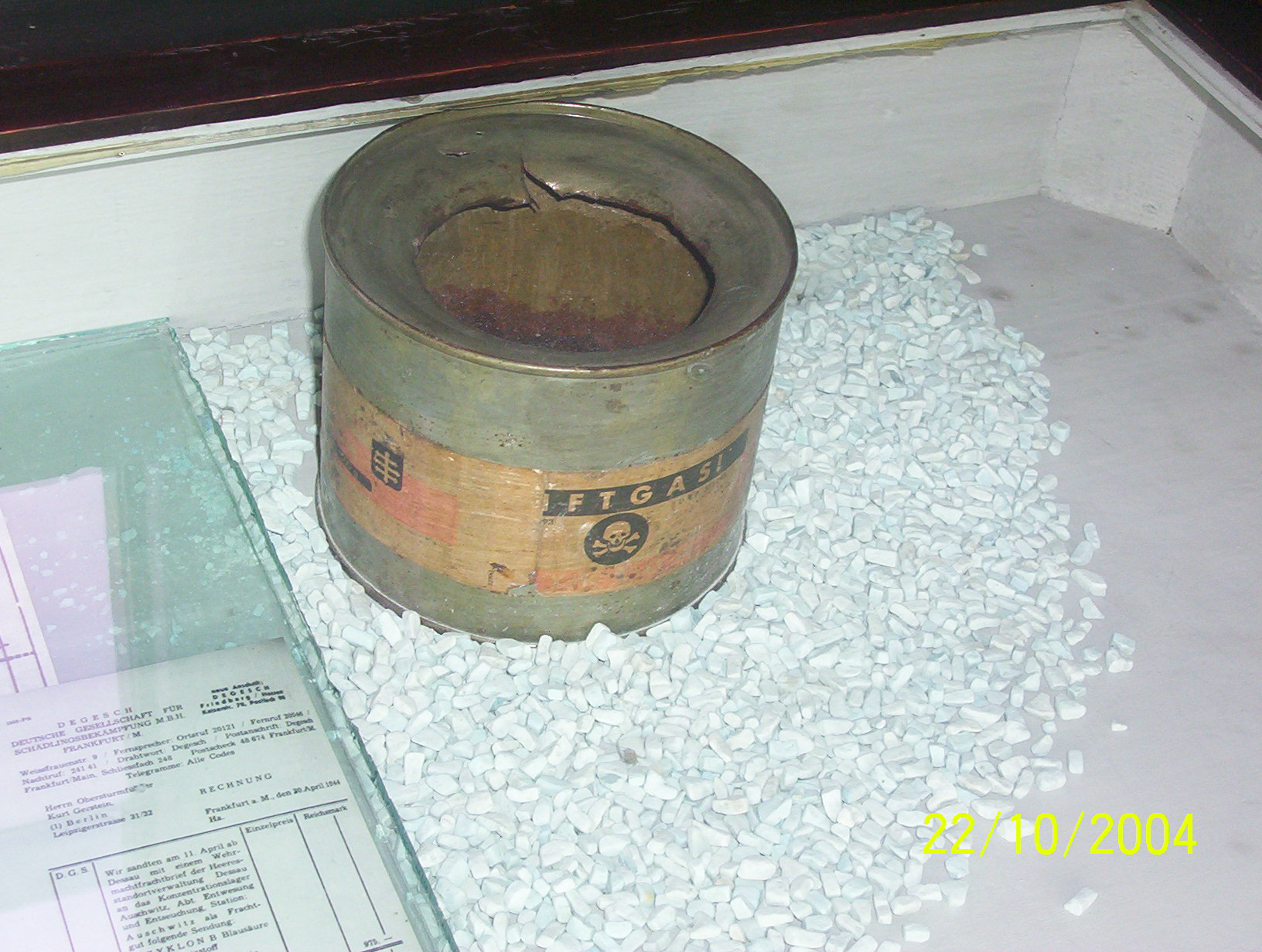 Koncentračný tábor Auschwitz-Birkenau Cyklon B